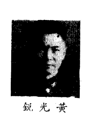 中文（中国大陆）: 制憲國民大會代表